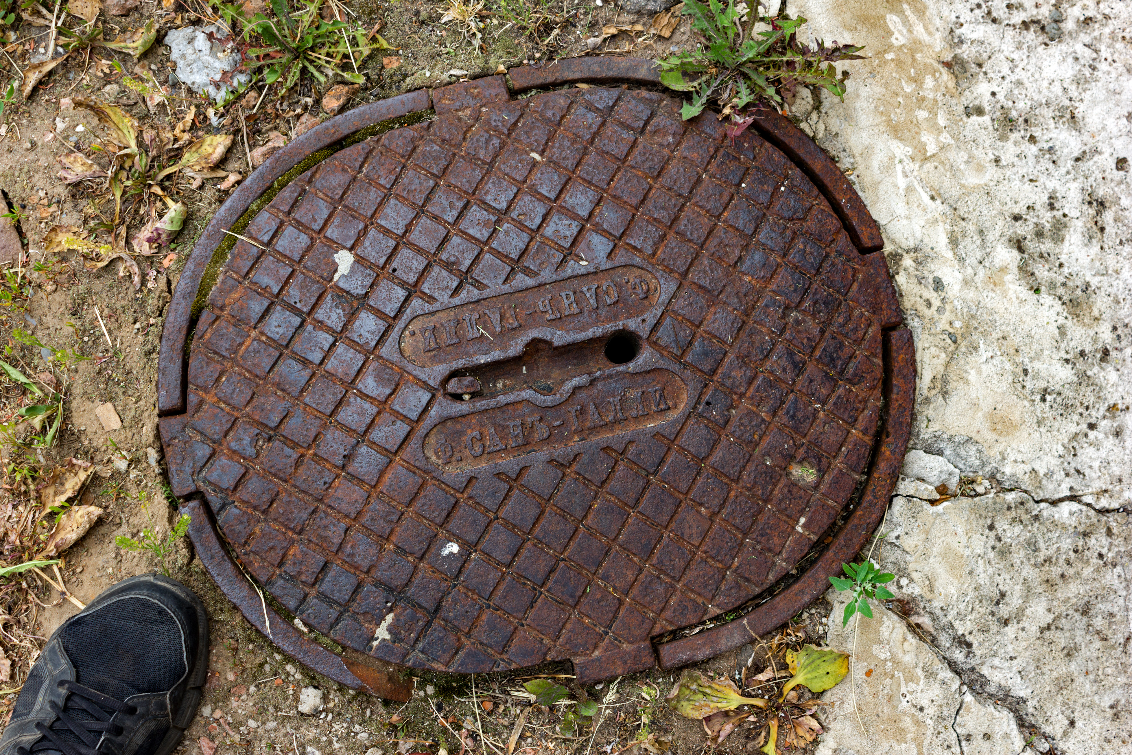 Усадьба Приклонских (Рукавишниковых): Окская улица, 53, Подвязье, Богородский район, Нижегородская область Люк у главного дома усадьбы